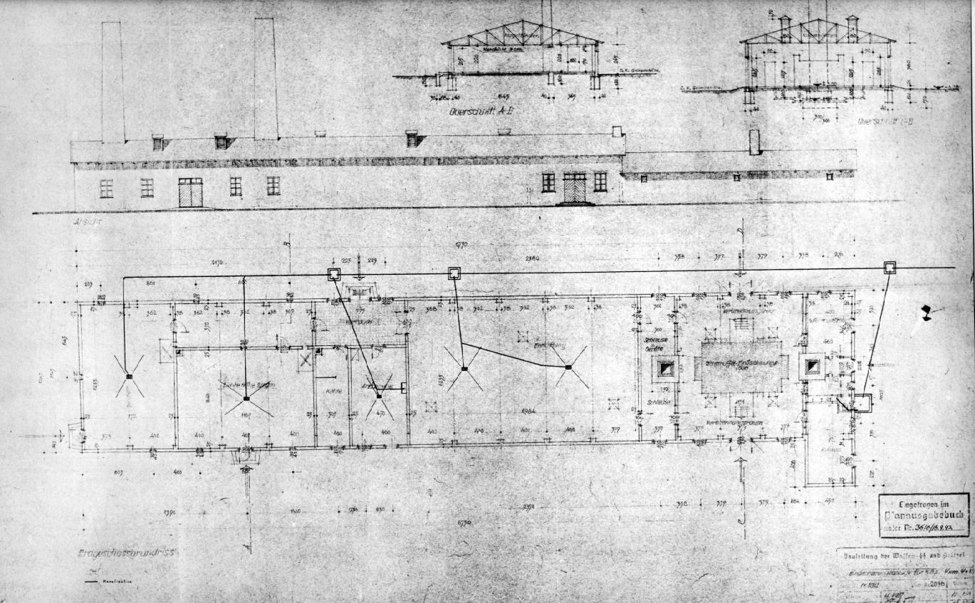 Krematorium IV Auschwitz-konstr-plan